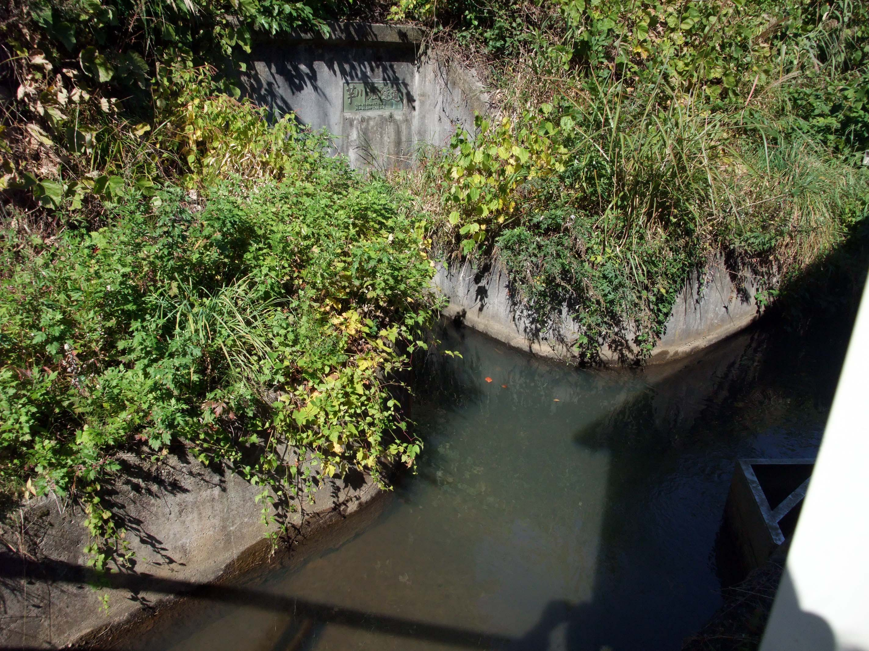 芋川用水の芋川隧道、飯綱町側出口